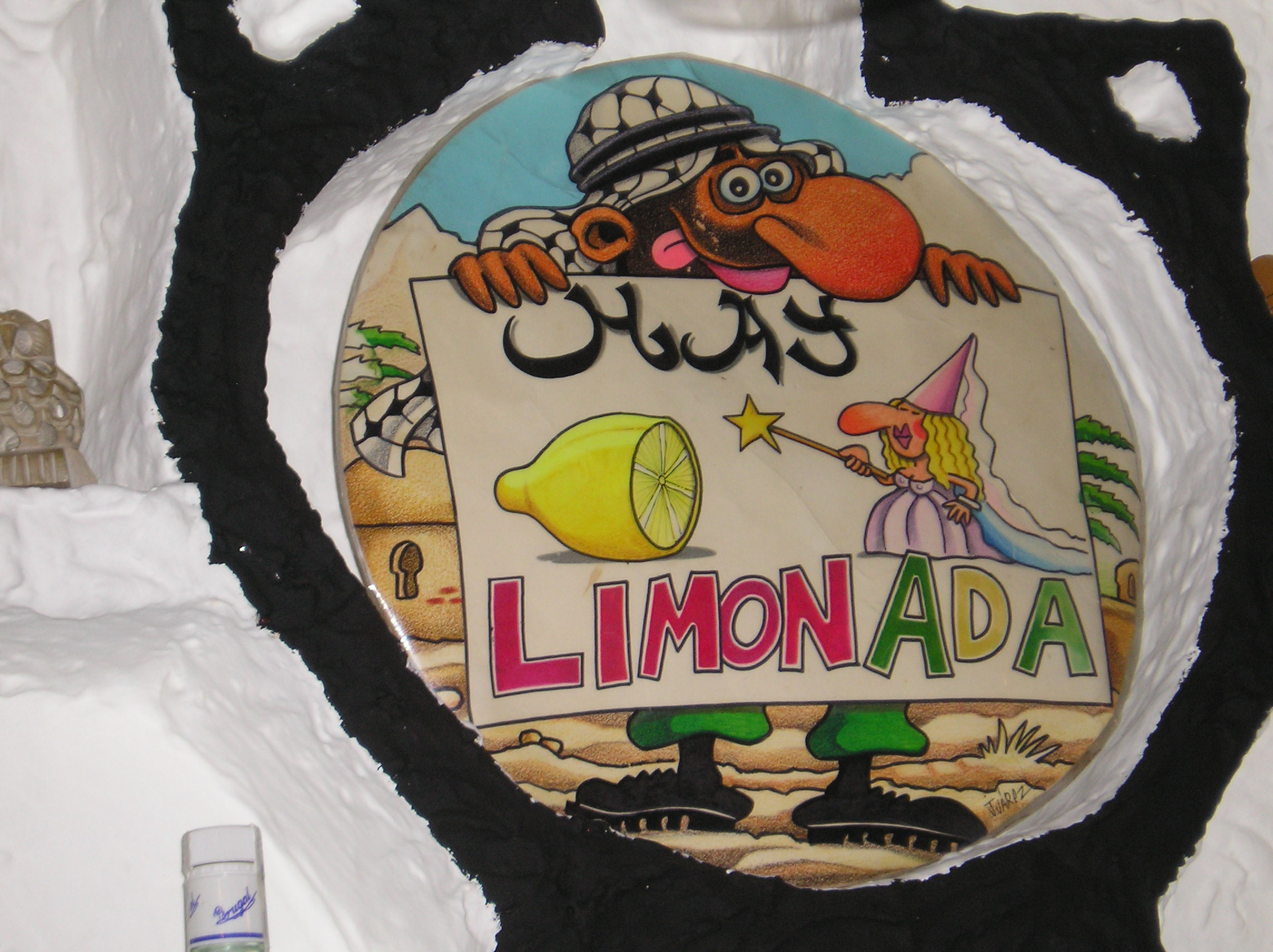 cartel anunciando que hay limonada de León